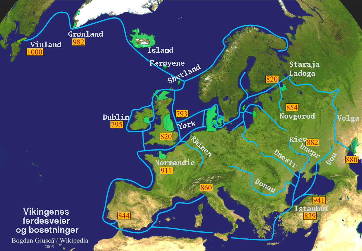 Vikingtiden i Norge